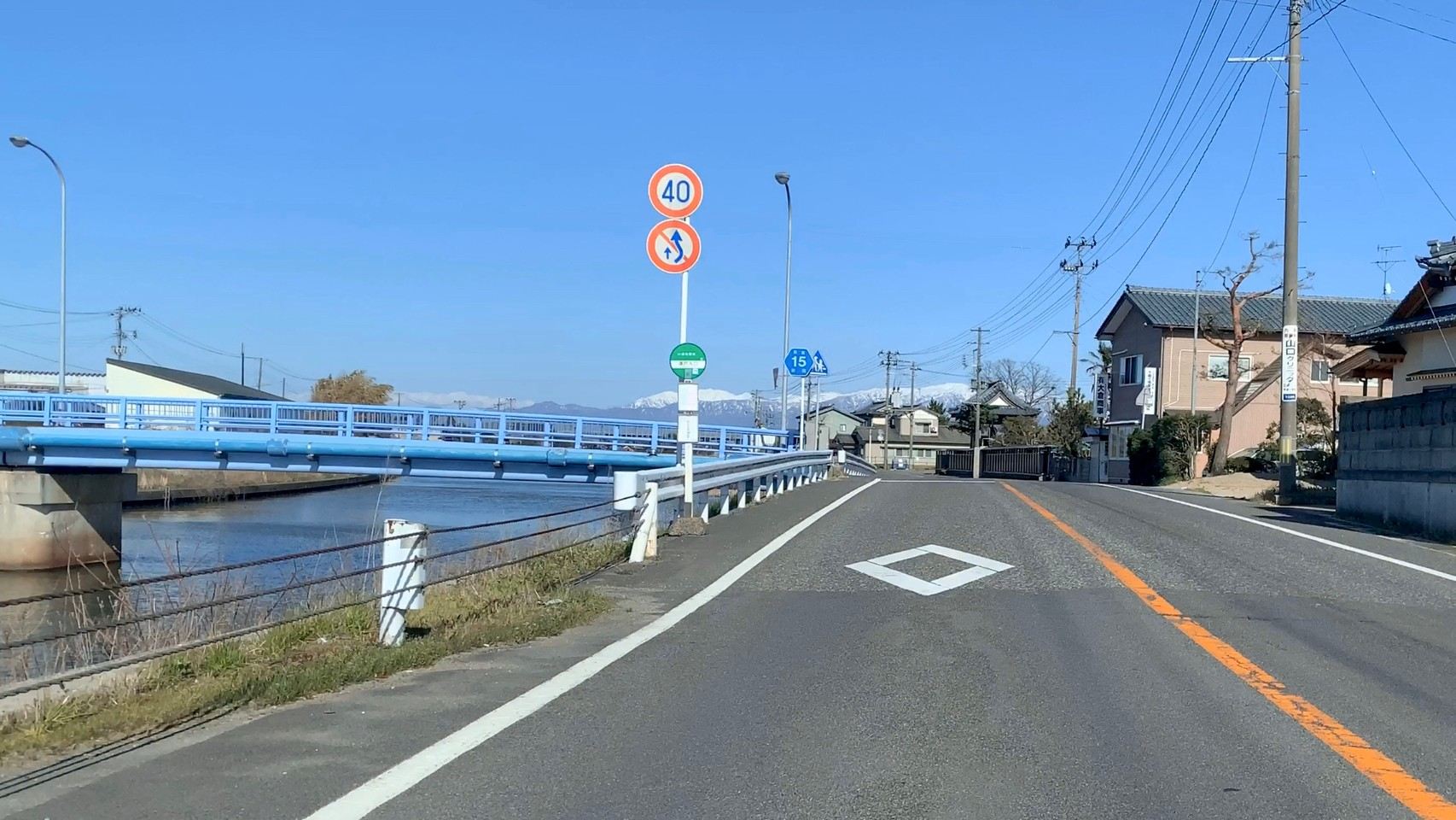 新潟県道15号新潟長浦水原線と新井郷川 「須戸入口」バス停付近（2020年4月）